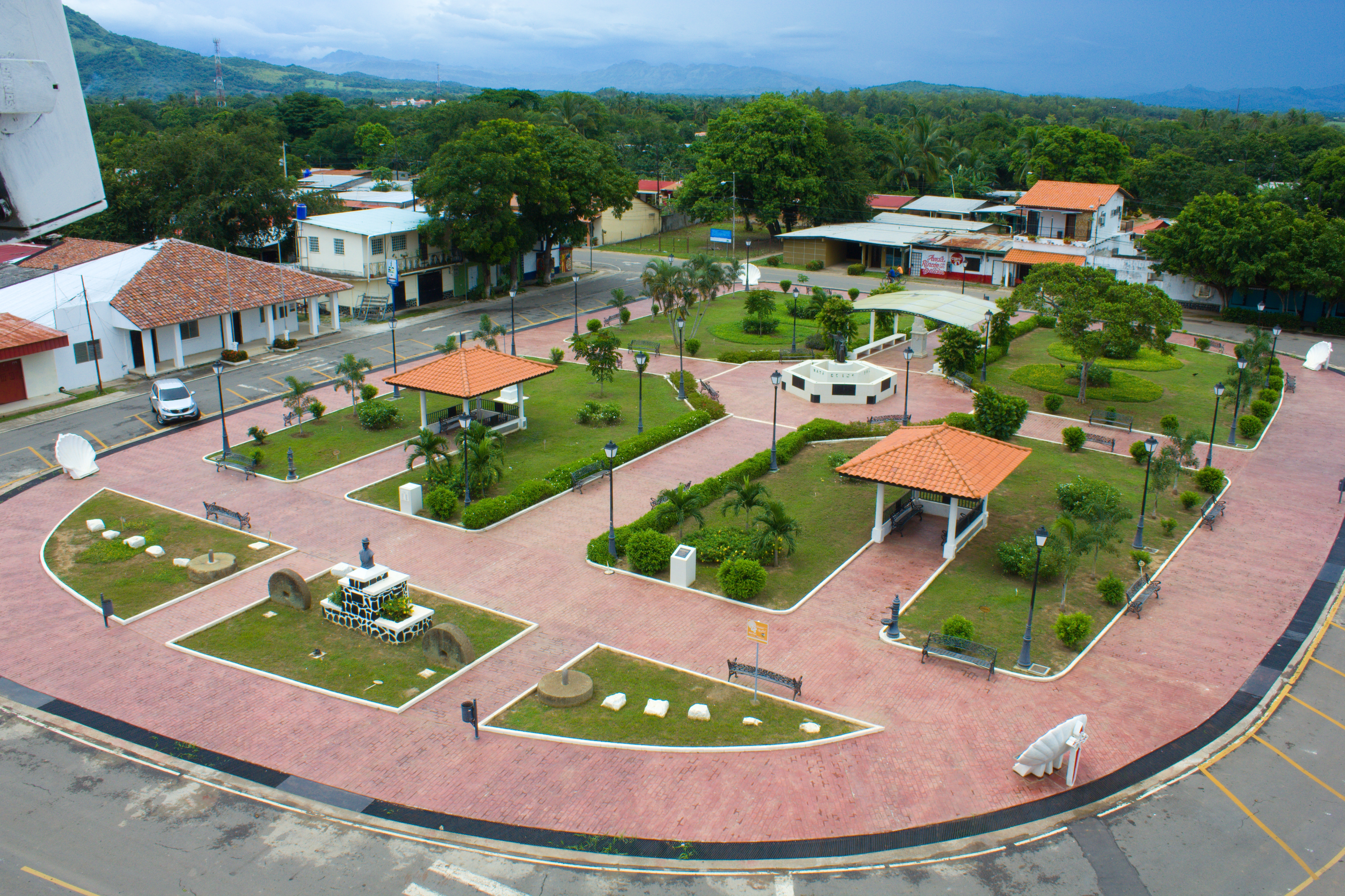 Parque de Natá. Provincia de Coclé, Panamá.